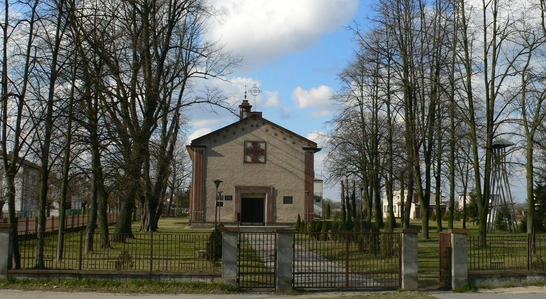 Kościół w Zajezierzu pod wezwaniem Matki Boskiej Nieustającej Pomocy